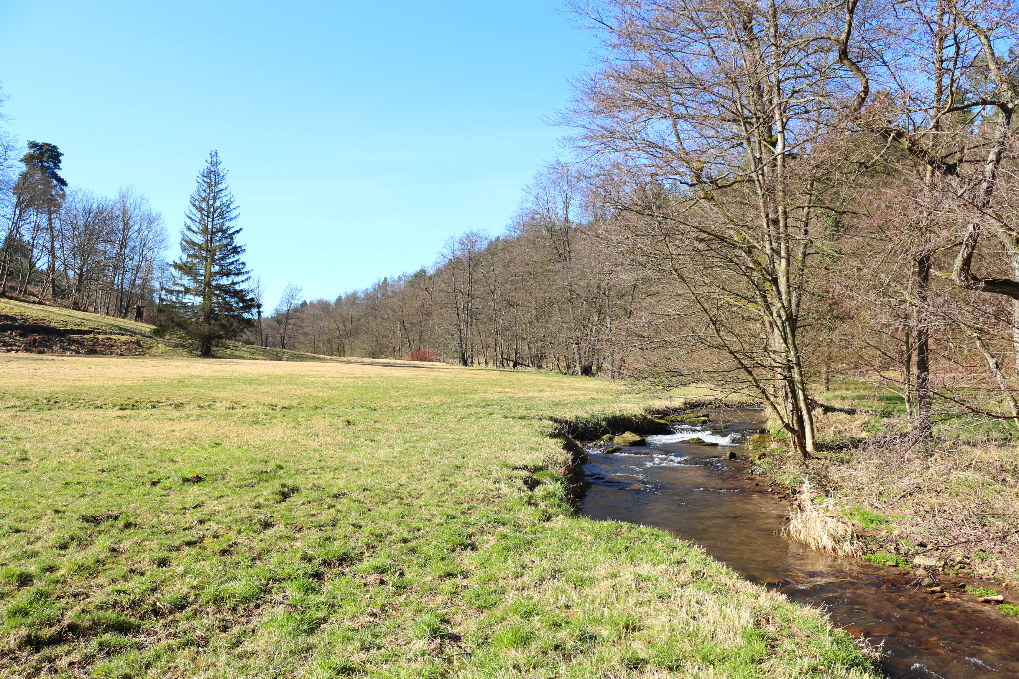 Moosalbtal: die Moosalb kurz vor der Mündung